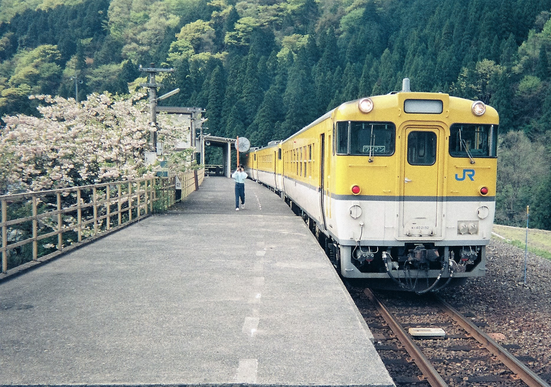 三段峡駅に停車中の可部線列車（キハ40 2132ほか、1999年5月）